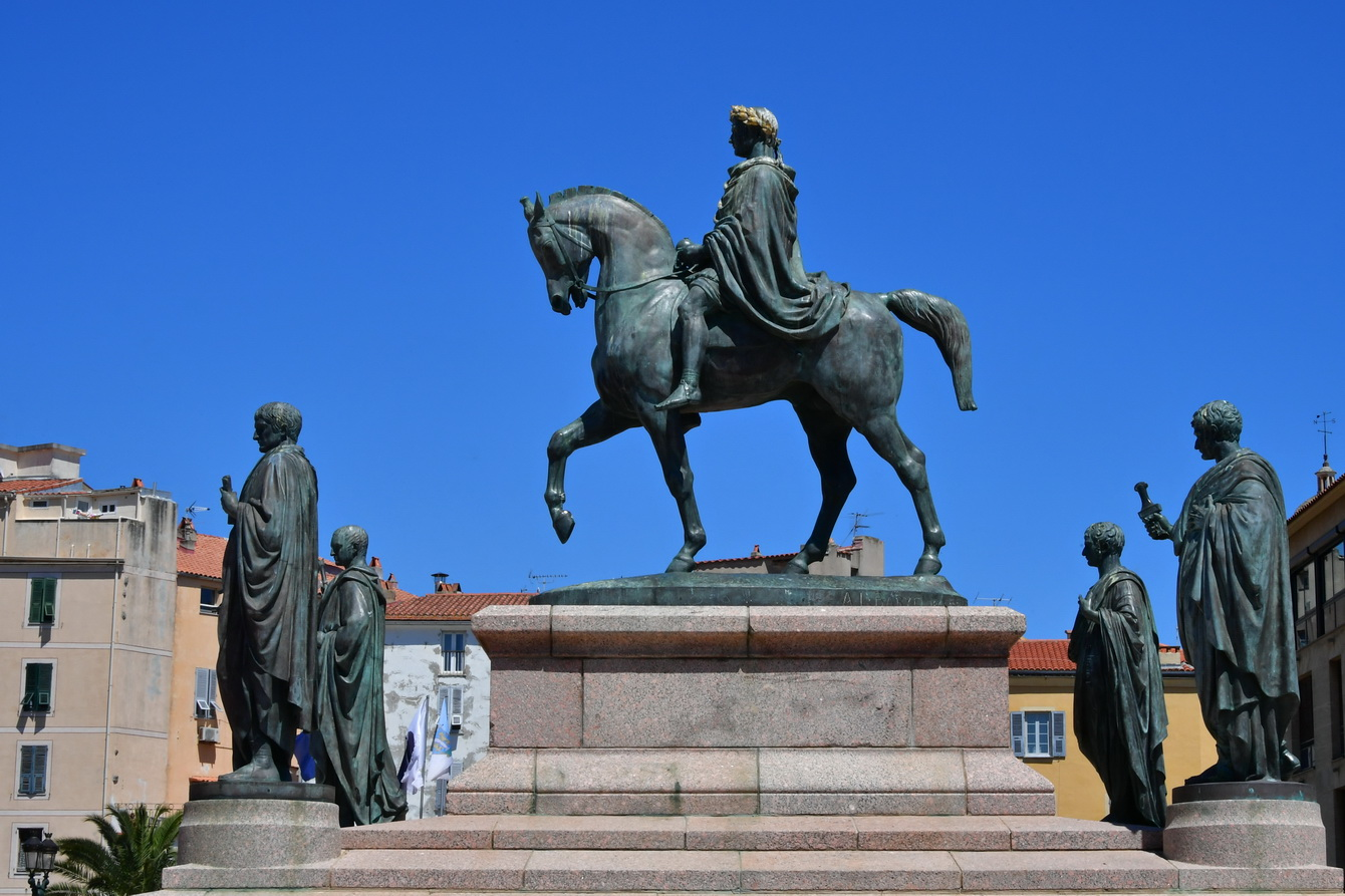 Ajaccio, Place De Gaulle-Statues de Napoléon avec ses quatre frères